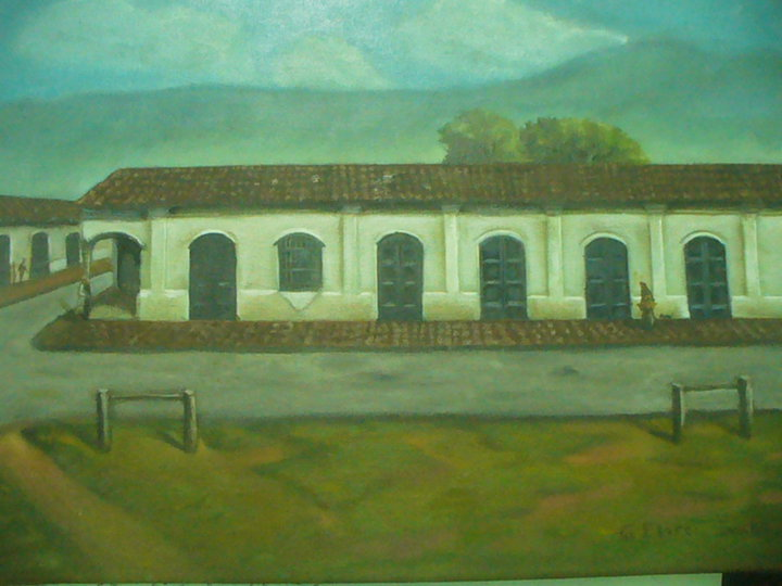 Casa natal de Juan Bautista Alberdi en un óleo de Gerardo L. Flores Ivaldi